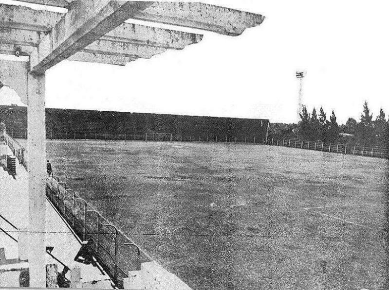 Estadio de Unión de Santa Fe en 1940